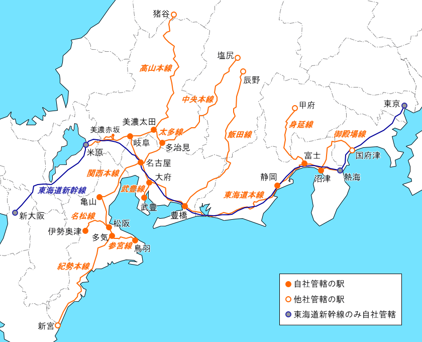 東海旅客鉄道路線図